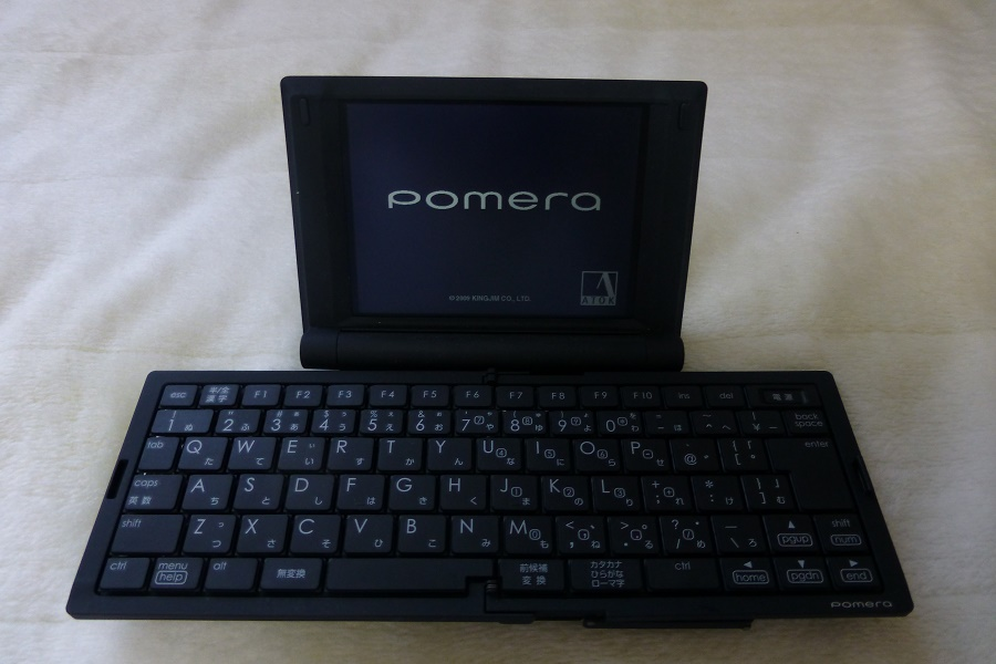 ポメラ DM20 キーボード展開状態